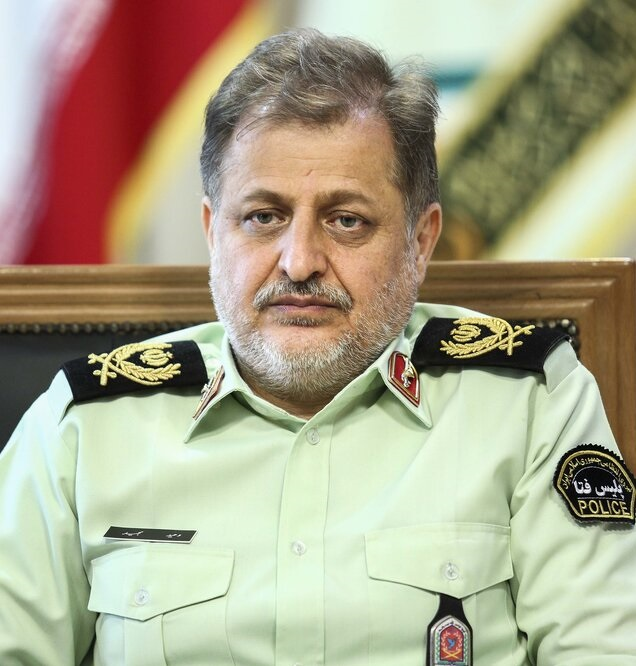 وحید مجید رئیس پلیس فتا تیر 1399